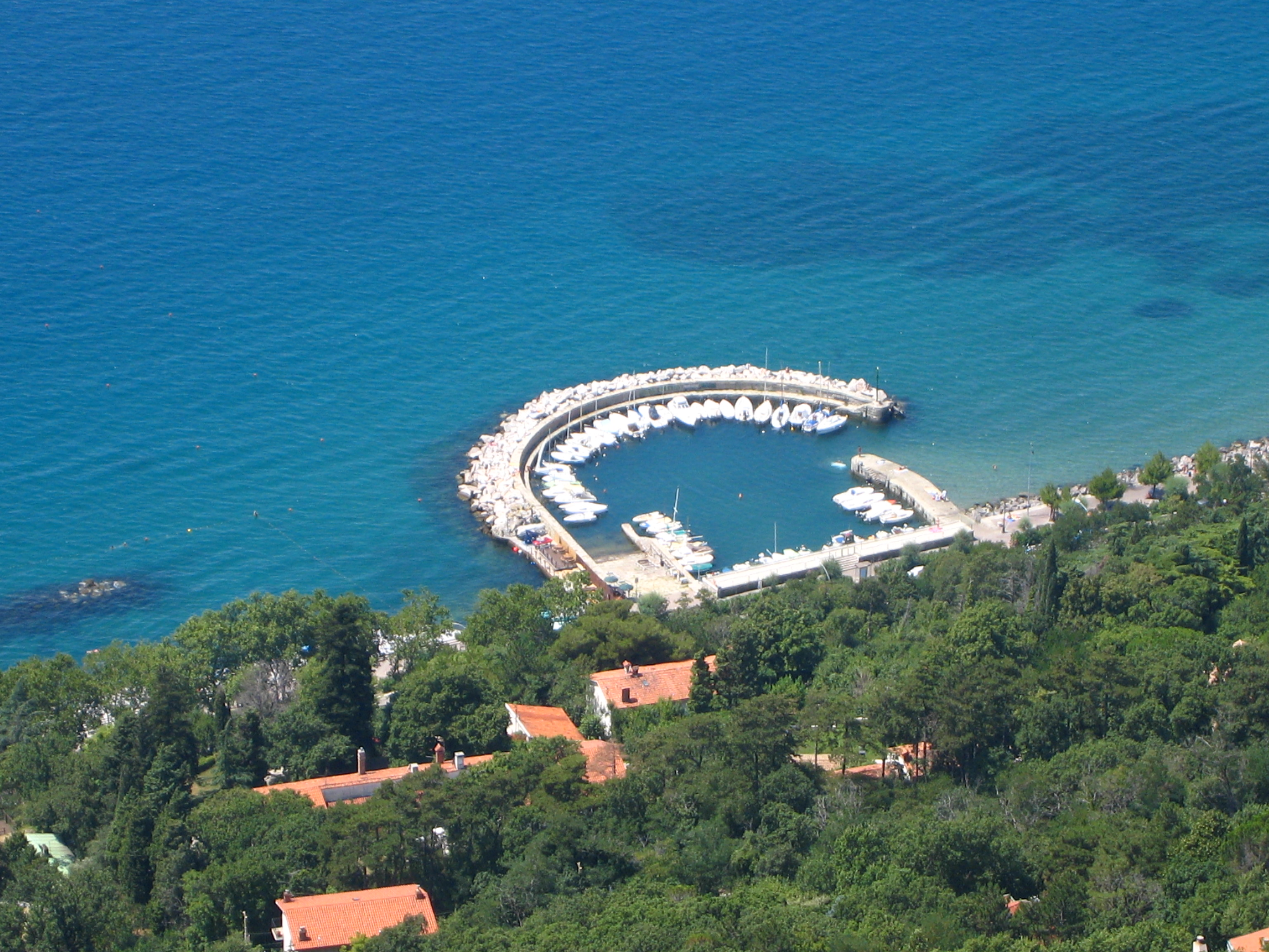 Il porticciolo del Cedas a Barcola (Trieste) visto dalla Vedetta Italia